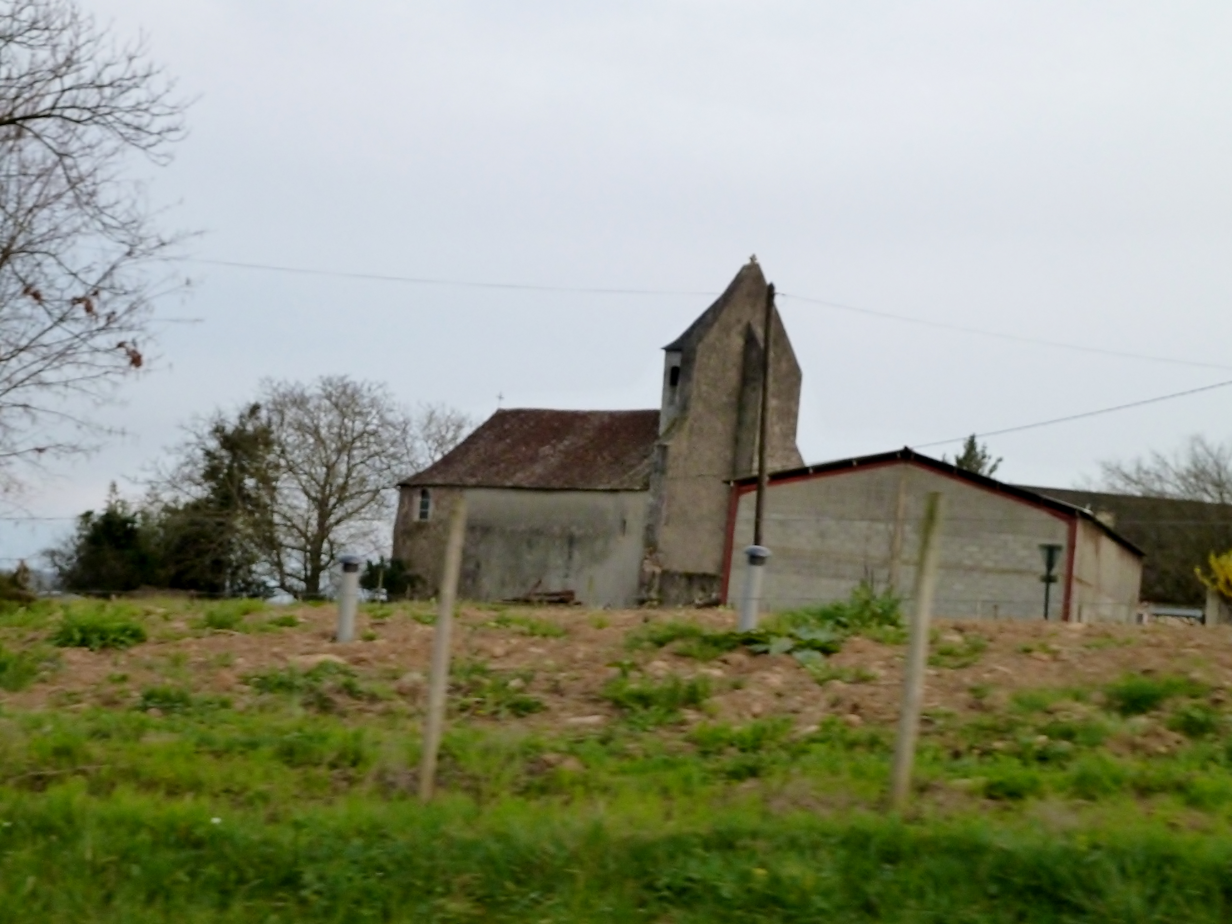 Église d'Auga